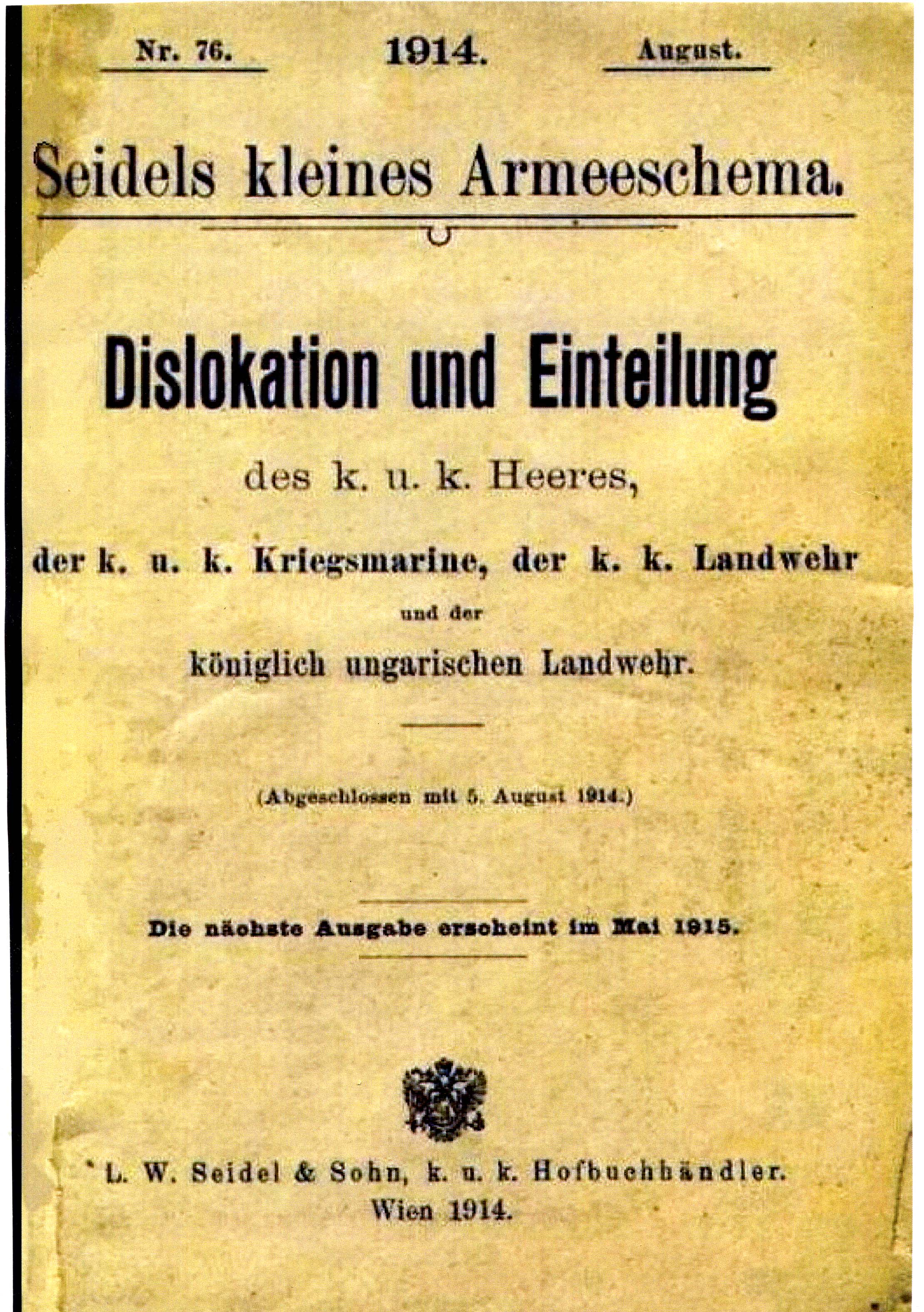 Dislozierung und Einteilung der k.u.k. Armee